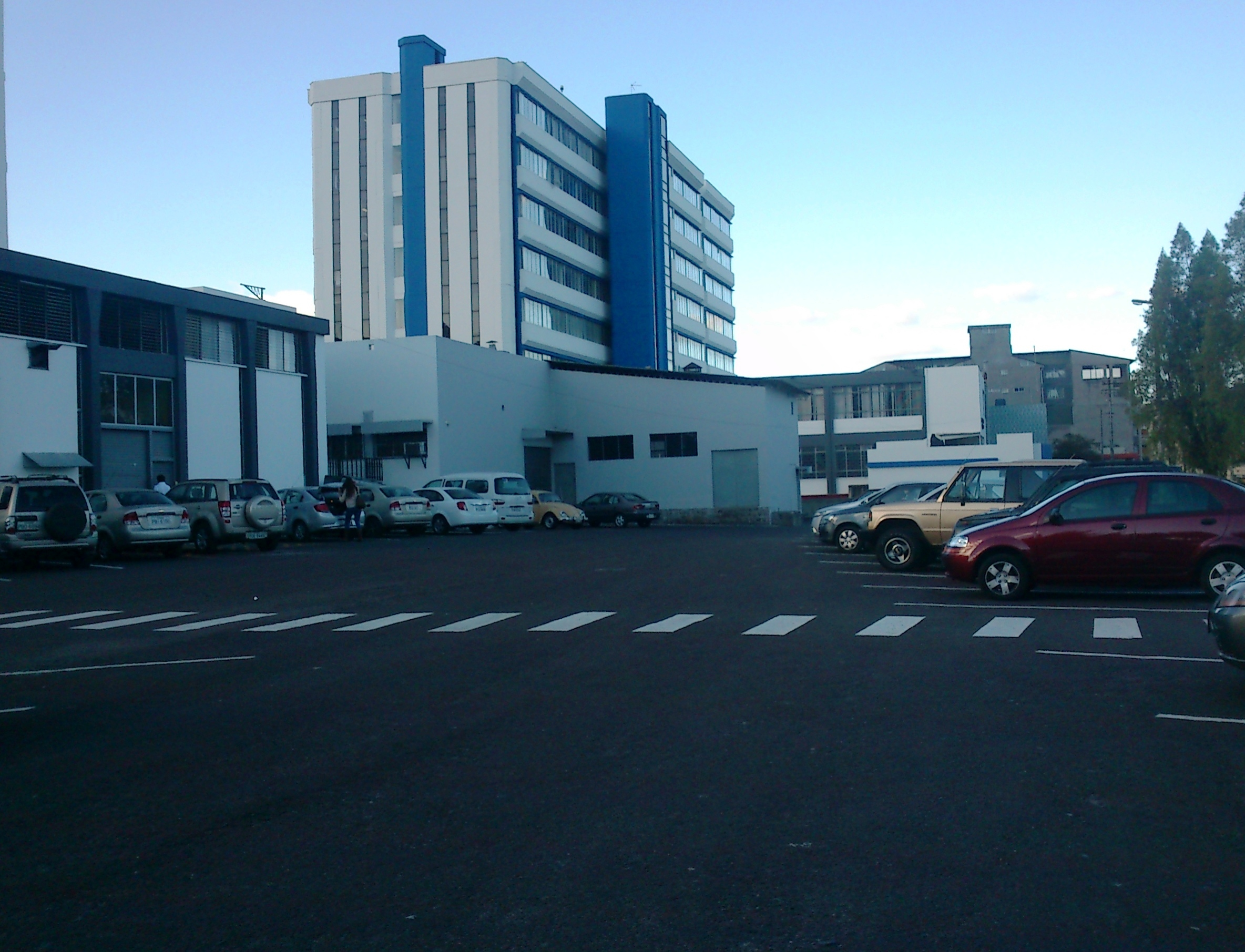 Edificio Facultad de Ingeniería Eléctrica y Electrónica / Facultad de Ingeniería Química y Agroindustria